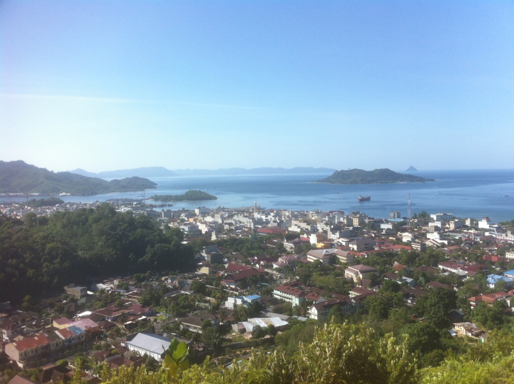 Pemandangan kota dari puncak bukit